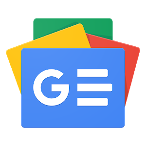 Google Noticias 2019 logo